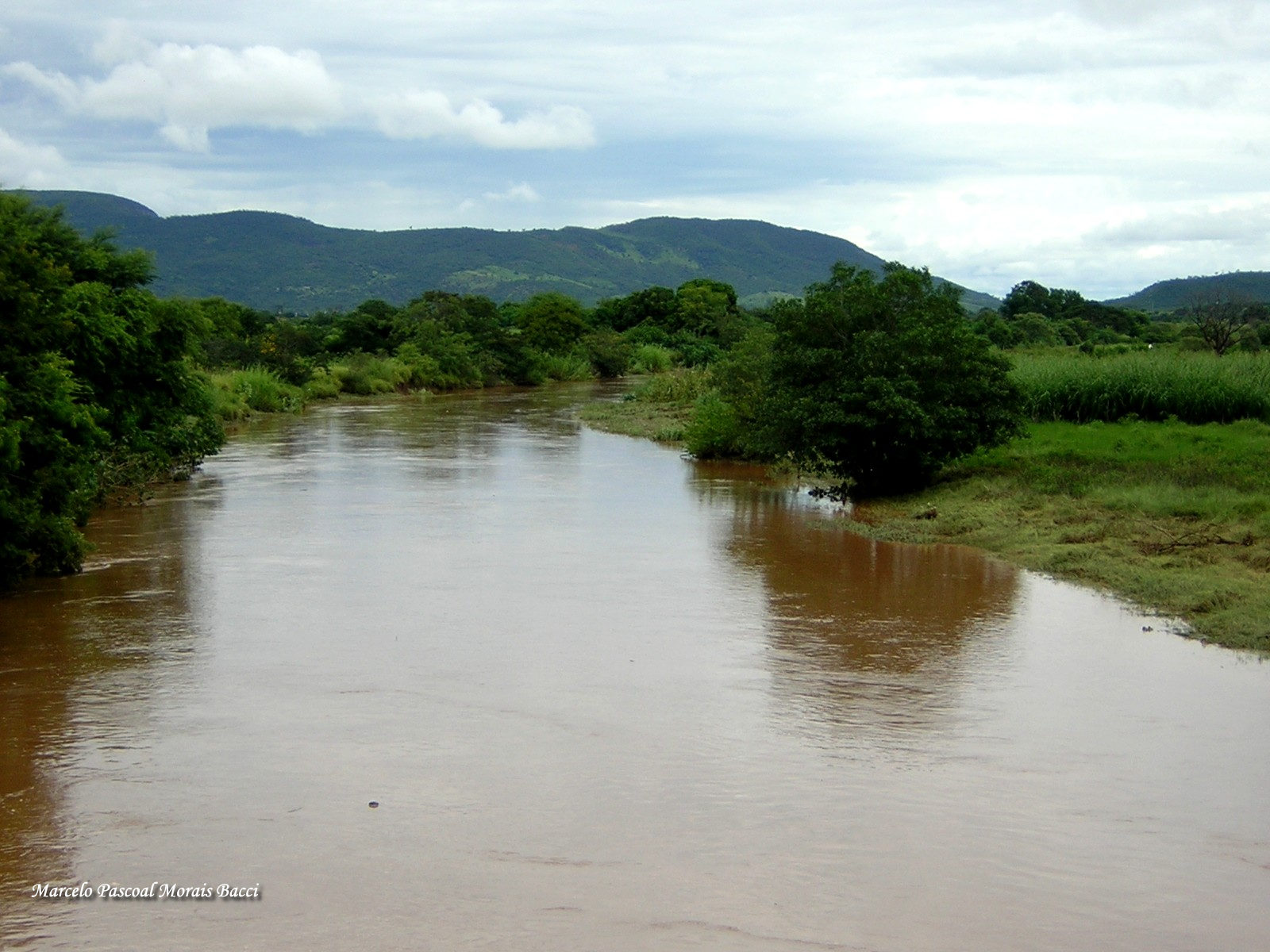 Descrição Rio Verde divisa de estados MG BA e de municipios Espinosa Urandi Fonte Marcelo Pascoal Morais Bacci Licensing Licença